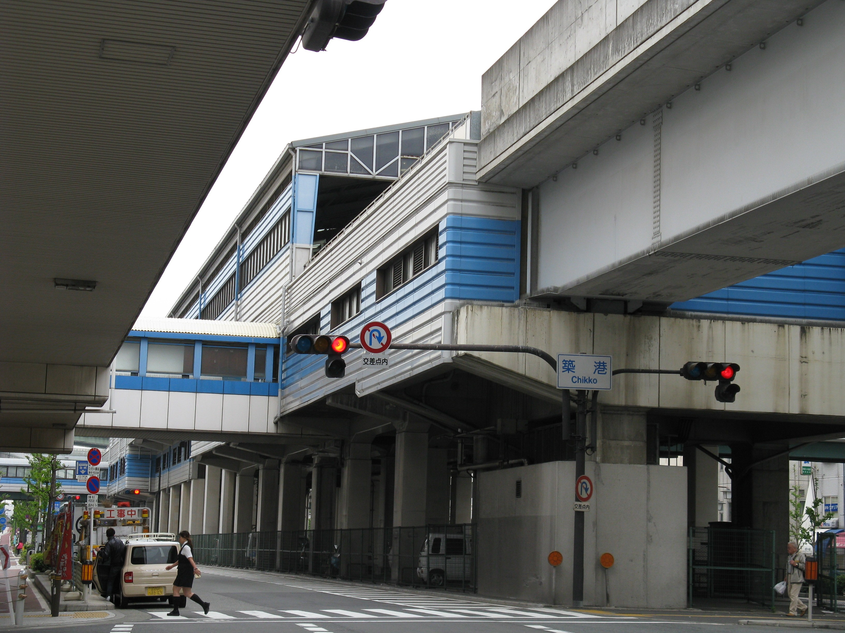 大阪港駅